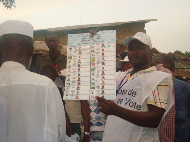 Guinea vote paper in 2007